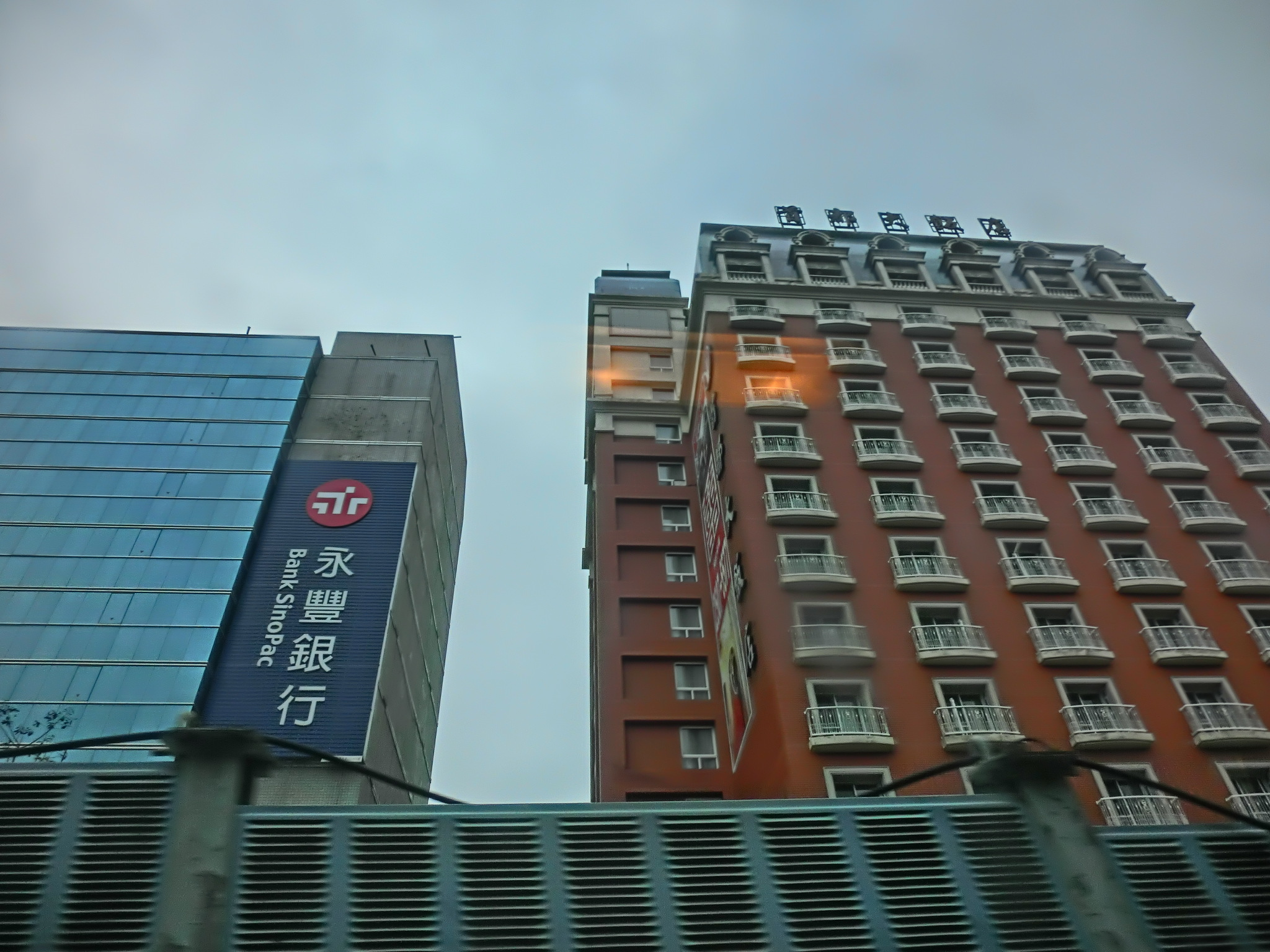 中文（台灣）: 臺北市中山區建國北路二段，永豐銀行建北大樓（左）、首都大飯店旗艦館（右）。